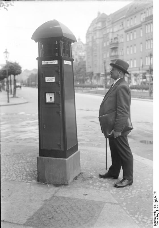 Berlin neue Feuermelder Der erste neue Feuermelder, der sich dem Berliner Strassenleben sichtbar anpasst, ist jetzt probeweise aufgestellt worden und sollen die alten Feuermelder nach und nach ausgewechselt werden. Information added by Wikimedia users.